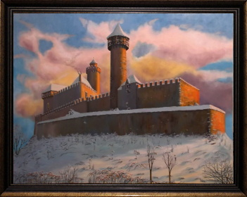 Hrad Kostomlaty, olej na plátně 94x72 cm